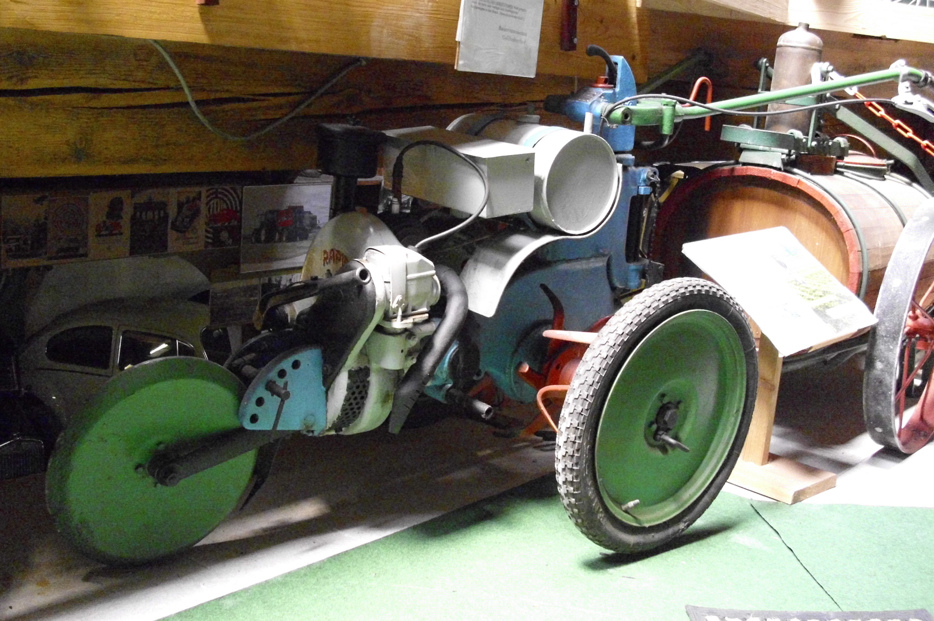 Rapid Motordrehhacke von 1939 im Bauern-Technik-Museum Gallhuberlhof